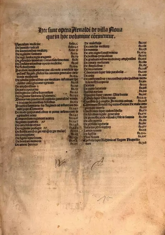 Arnaldus_de_Villa_Nova_Opera_1504_first_page